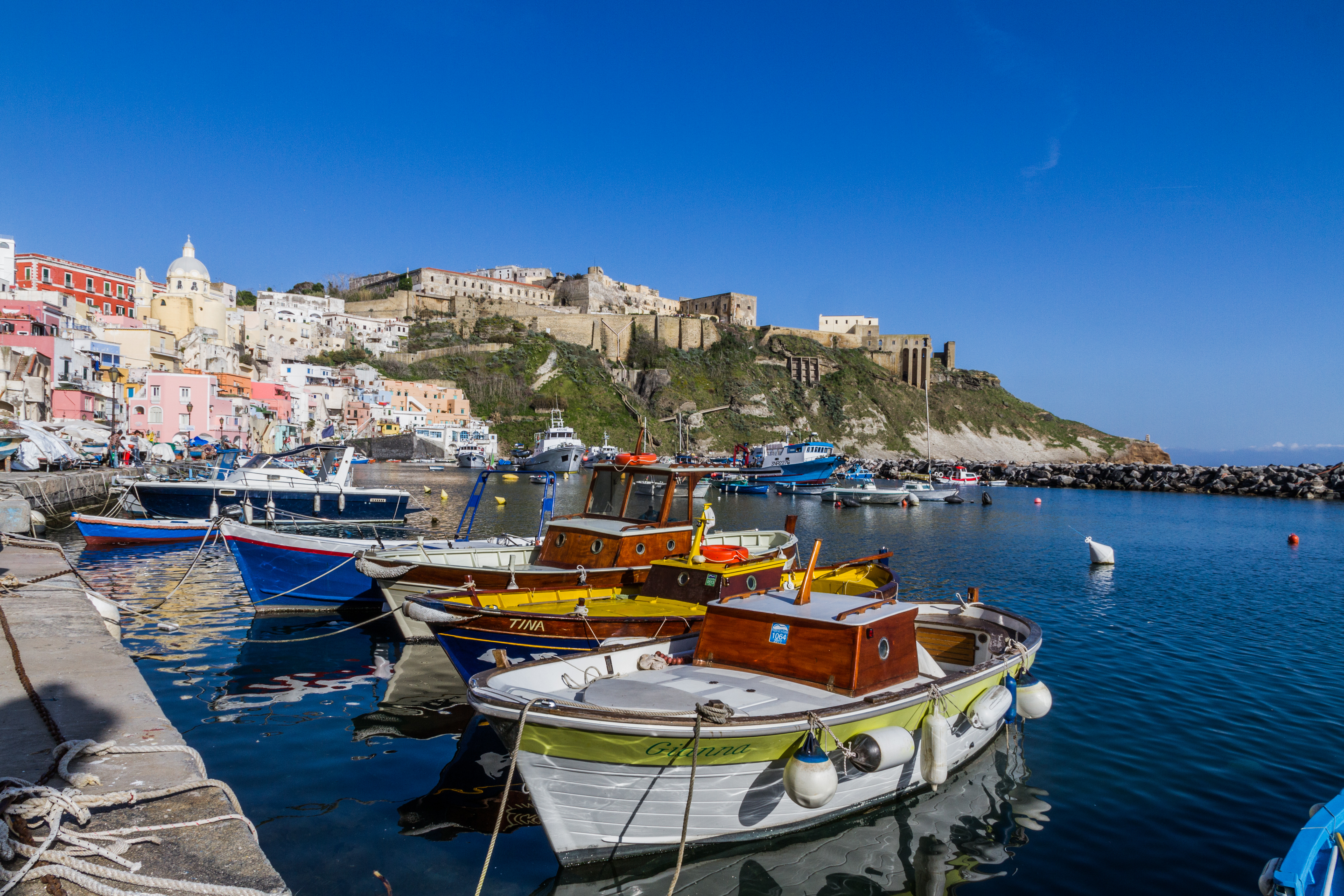 Corricella